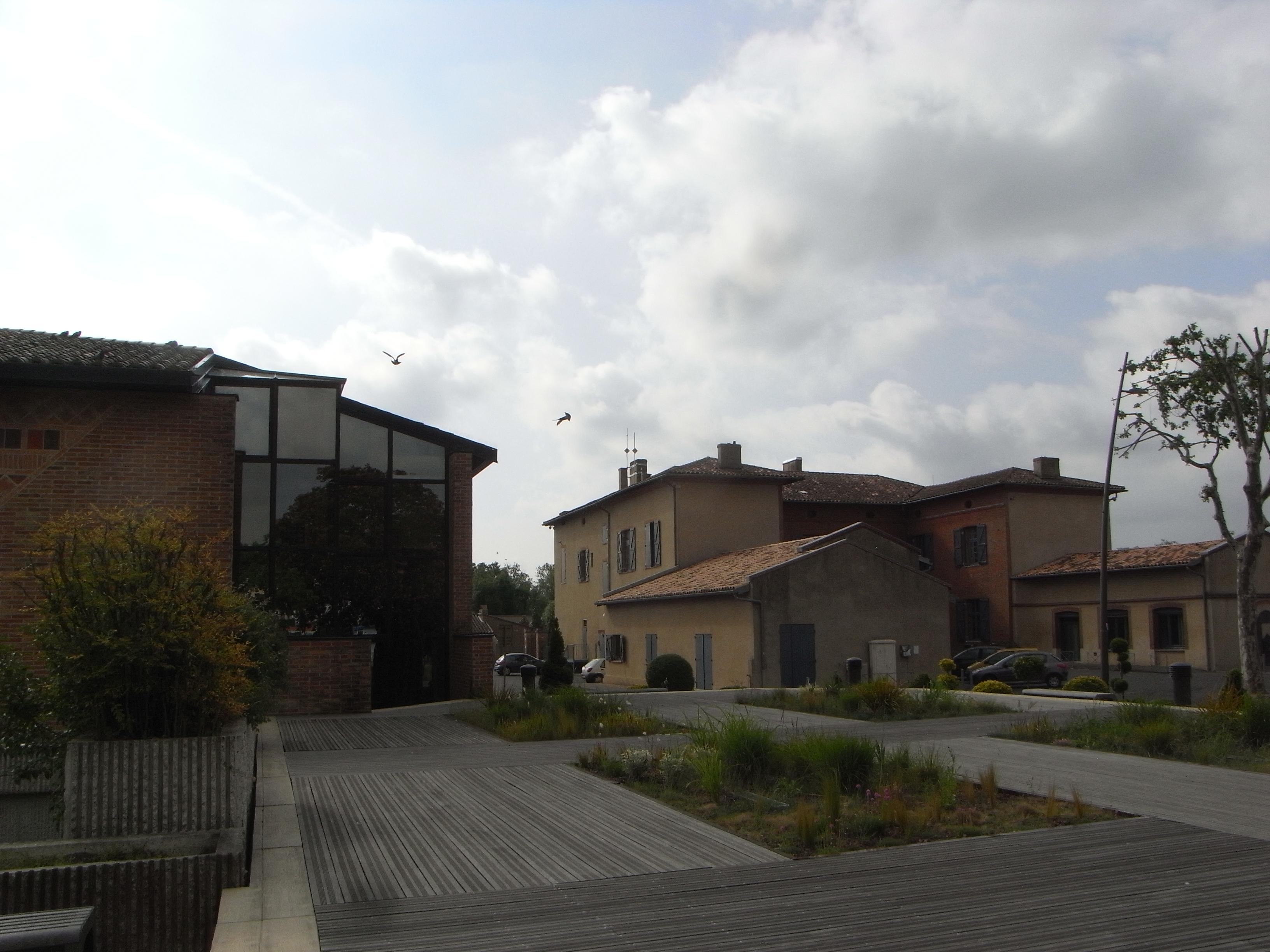 Bibliothèque/école de musique et mairie de Tournefeuille (Haute-Garonne, France).